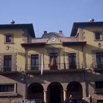 Ayuntamiento de Lena, Asturias (España)